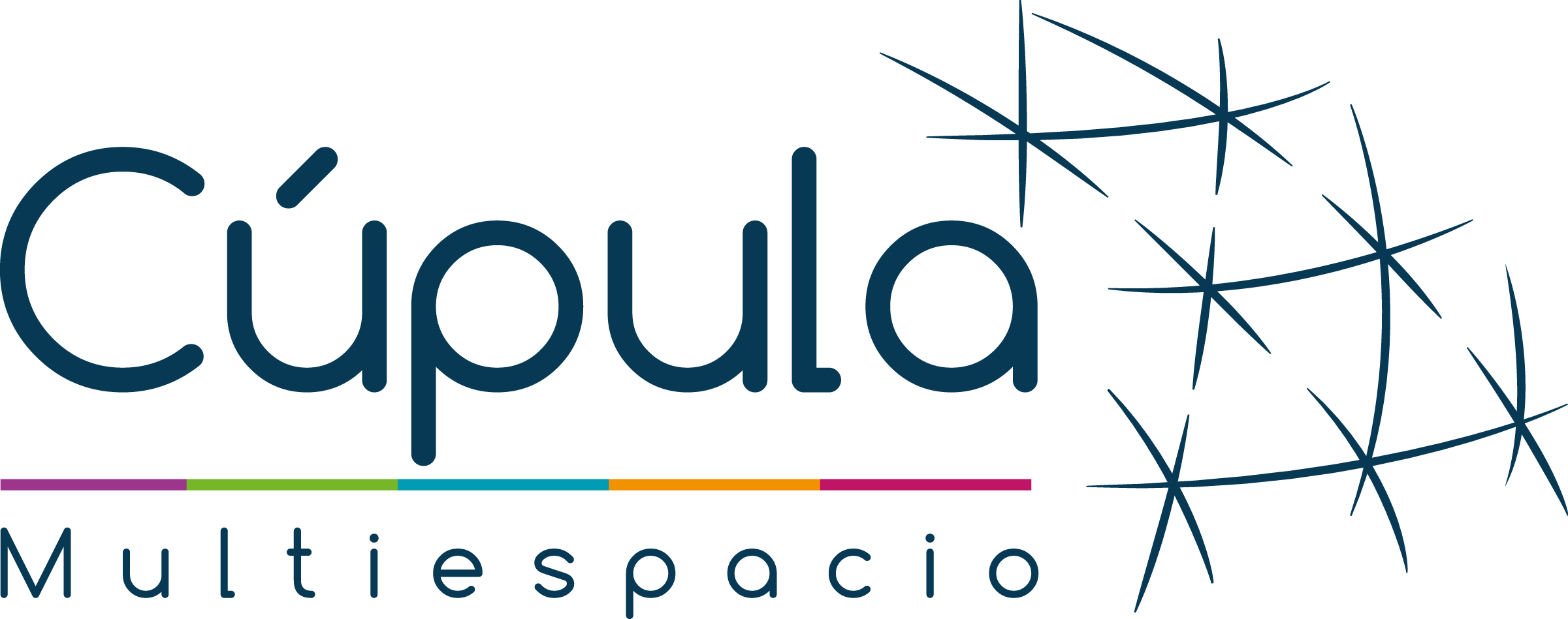 Nueva imagen Cúpula Multiespacio